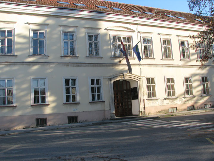 Zgrada Gradskog poglavarstva Donje Stubice, Krapinsko-zagorska županija